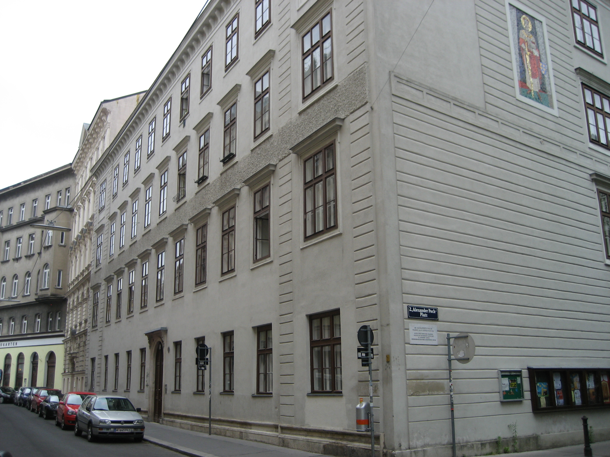 Das Haus Kleine Pfarrgasse 24 in der Leopoldstadt, in Wien, Rückseite des Benefiziatenhauses, Pfarrhof der Pfarre St. Leopold